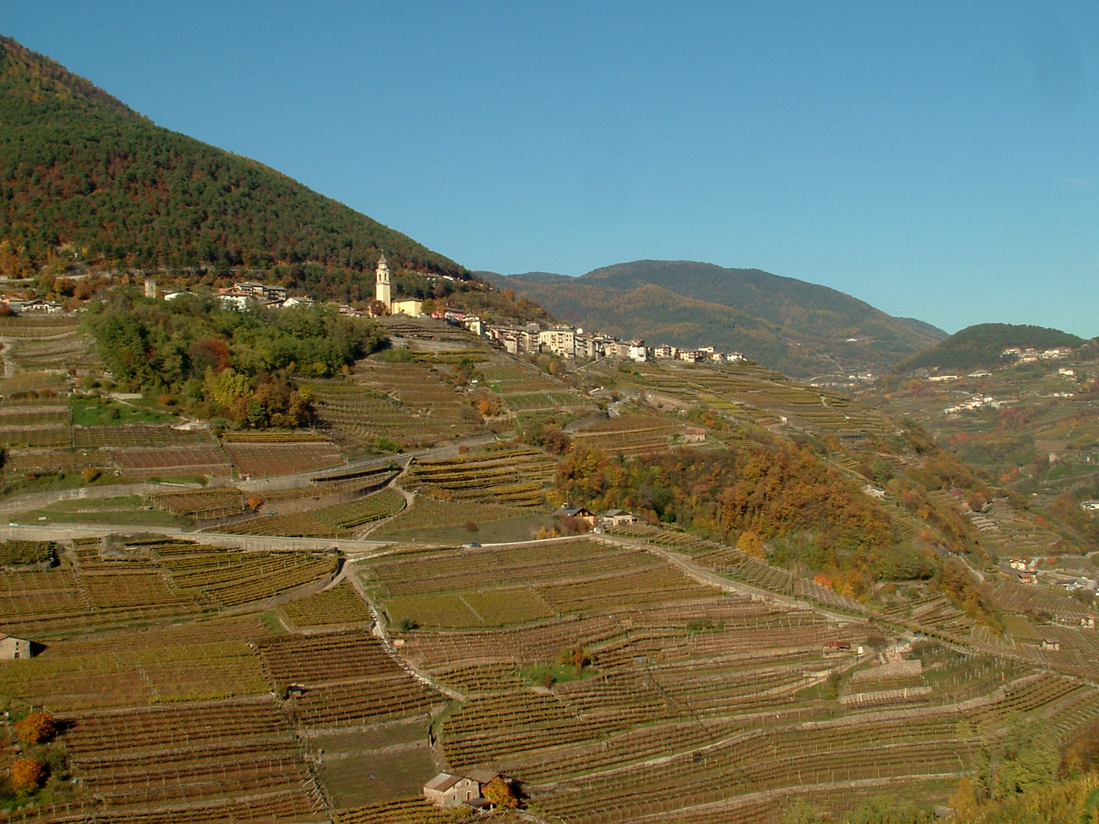 vista del comune di Faver (Italia) dalla campagna di Cembra.